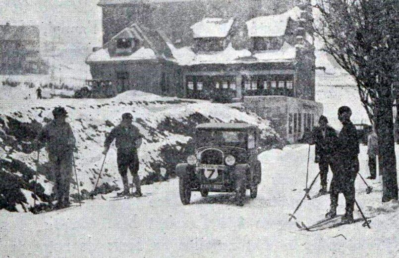 Le rallye féminin Paris-St Raphael en 1930.